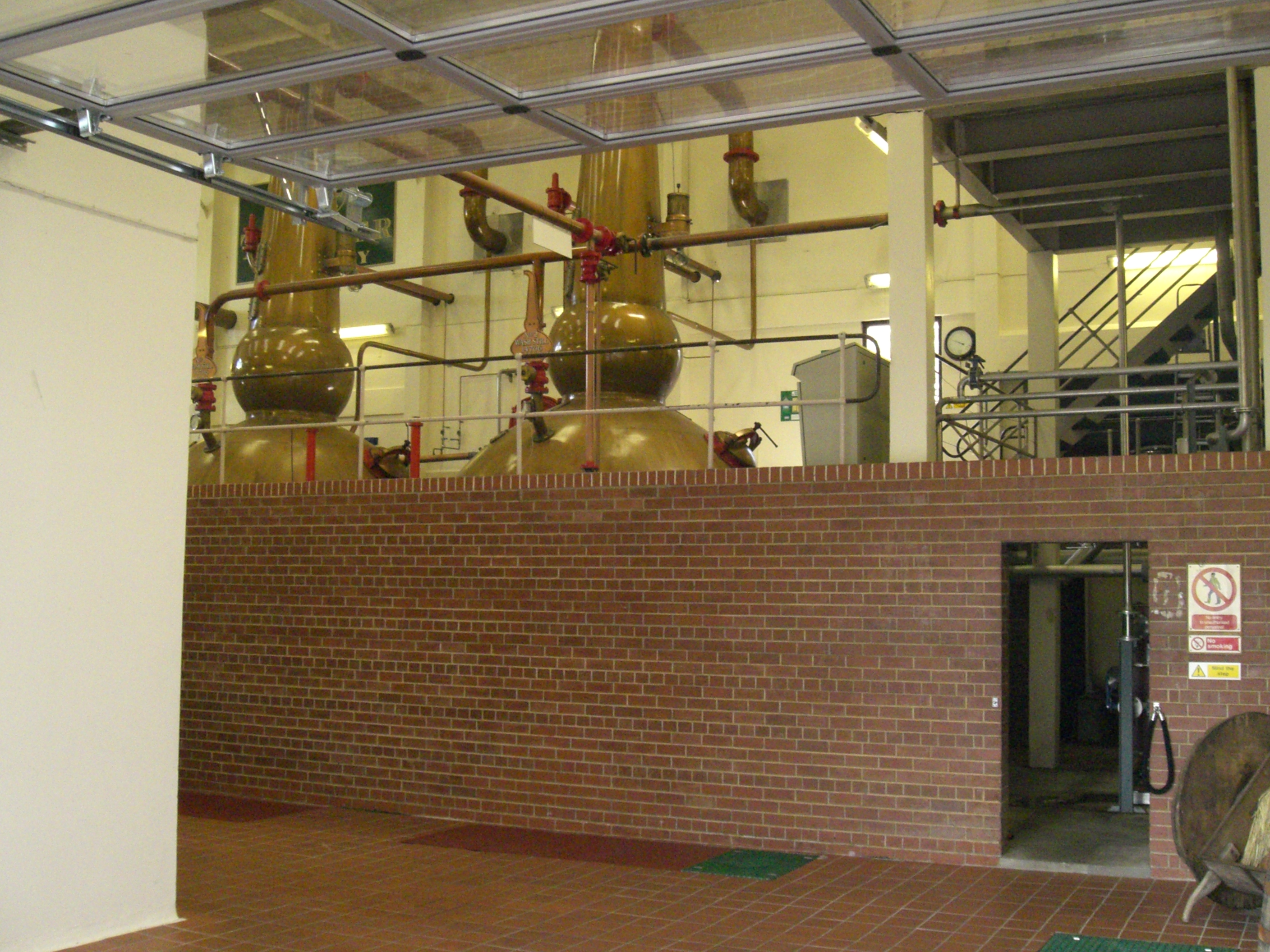 Talisker Still, Syke, Scotland